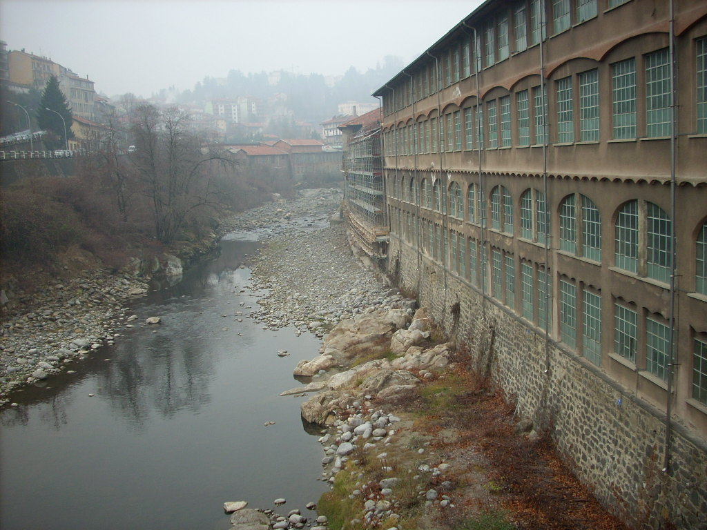 fiume Cervo dal ponte di via Milano a Chiavazza (Biella) Autore DracoRoboter (presente anche su flickr stesso autore)